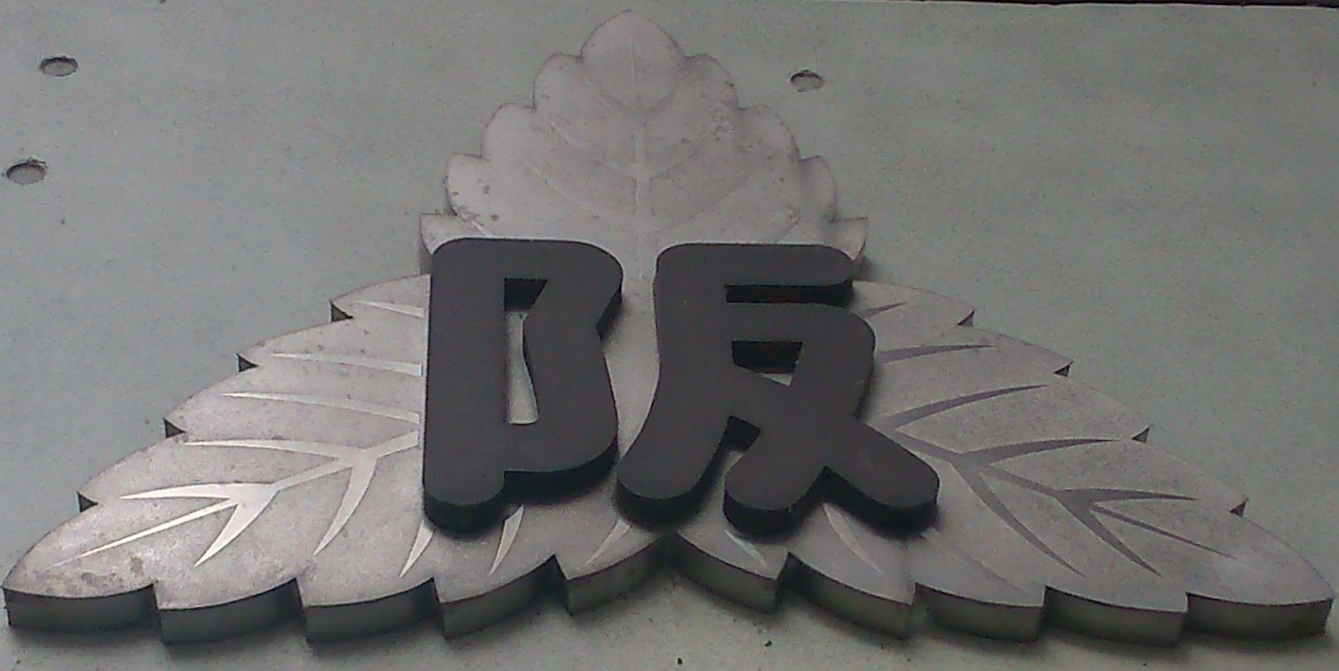 新潟県 長岡市にて撮影。